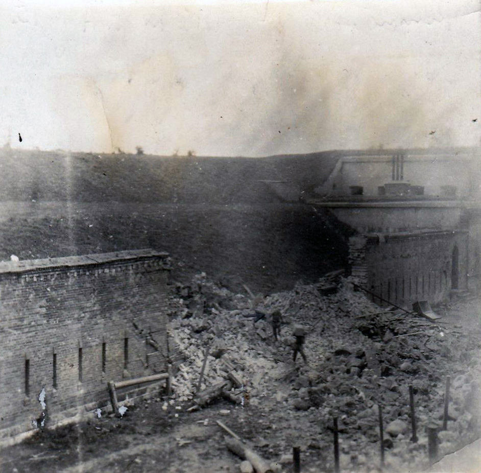 Kauno tvirtovės I fortas, 1915 m. vasara, vokiečių 305 mm haubicos sviedinio pataikymo pasekmės.